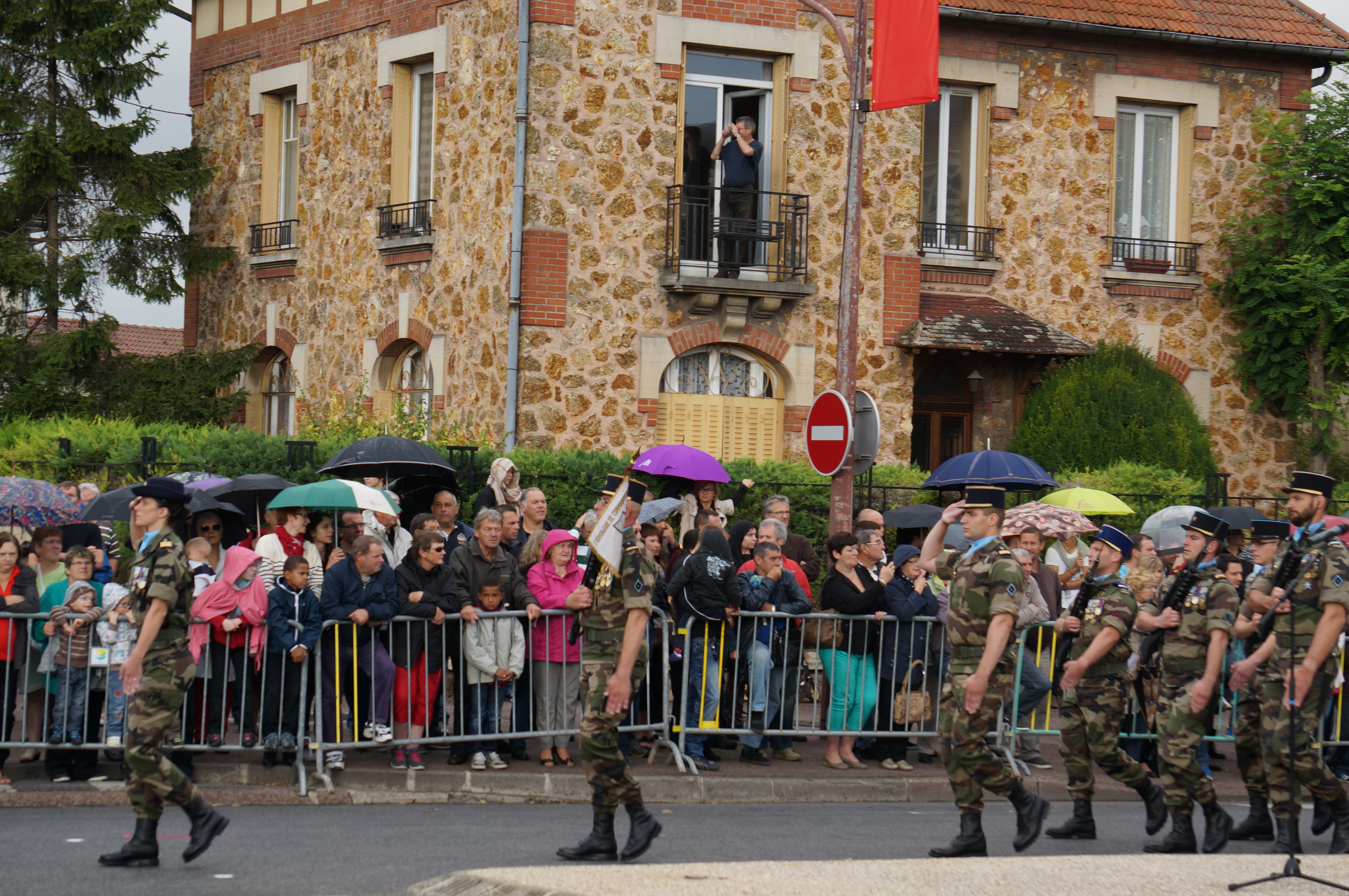 Compagnie_de_commandement de la 1ere brigade mécanisée.